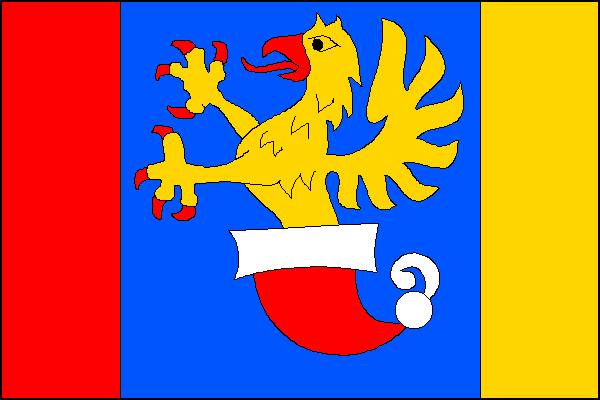 vlajka, Všechovice, okres Přerov